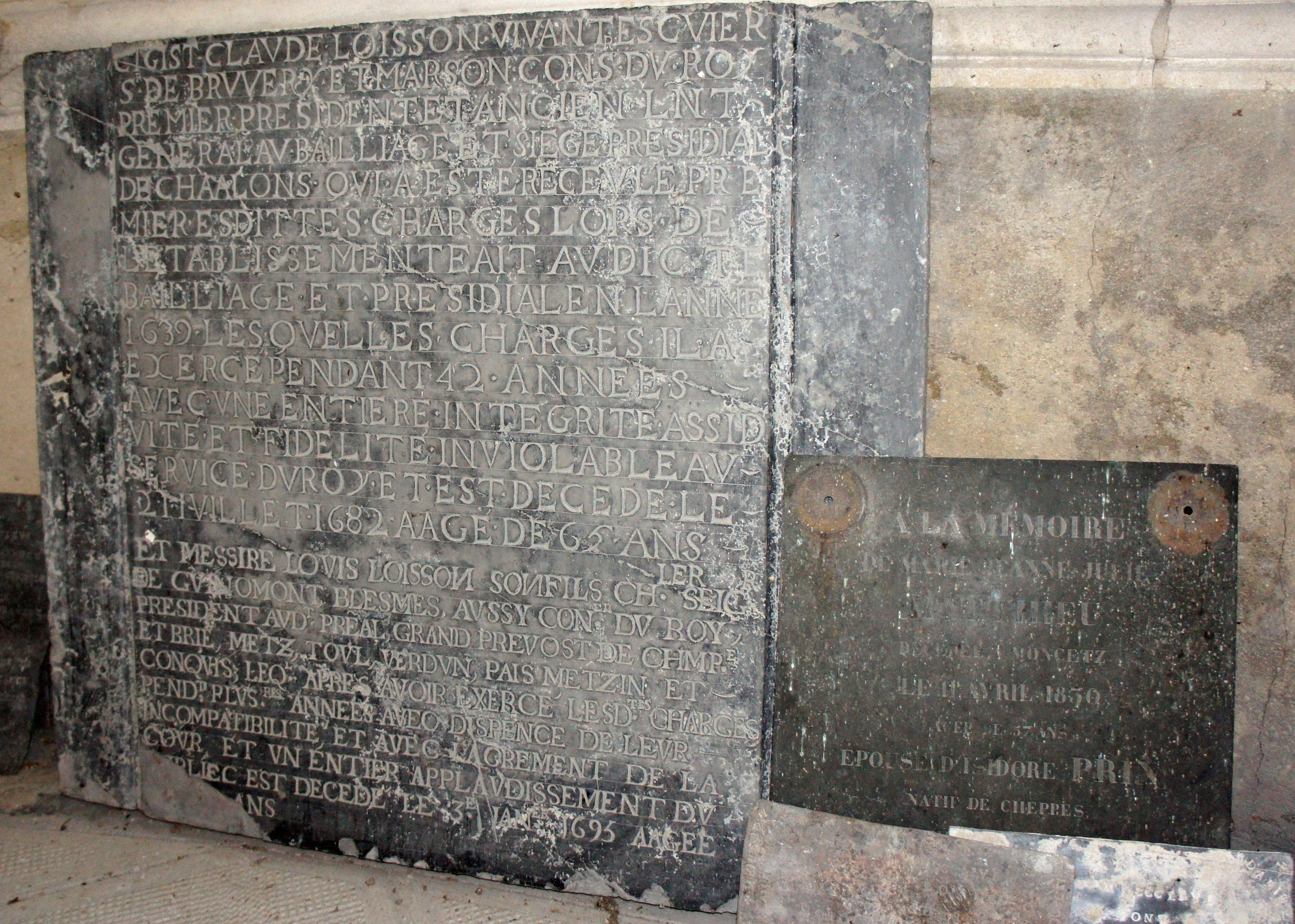 Dans la chapelle du château de Mairy (Marne, France) qui se trouve dans l'une des tours, les gisants de Claude Loisson, Louis de Guinaumont chevalier de Loisson et Marie Jeanne Matthieu épouse Prin. .